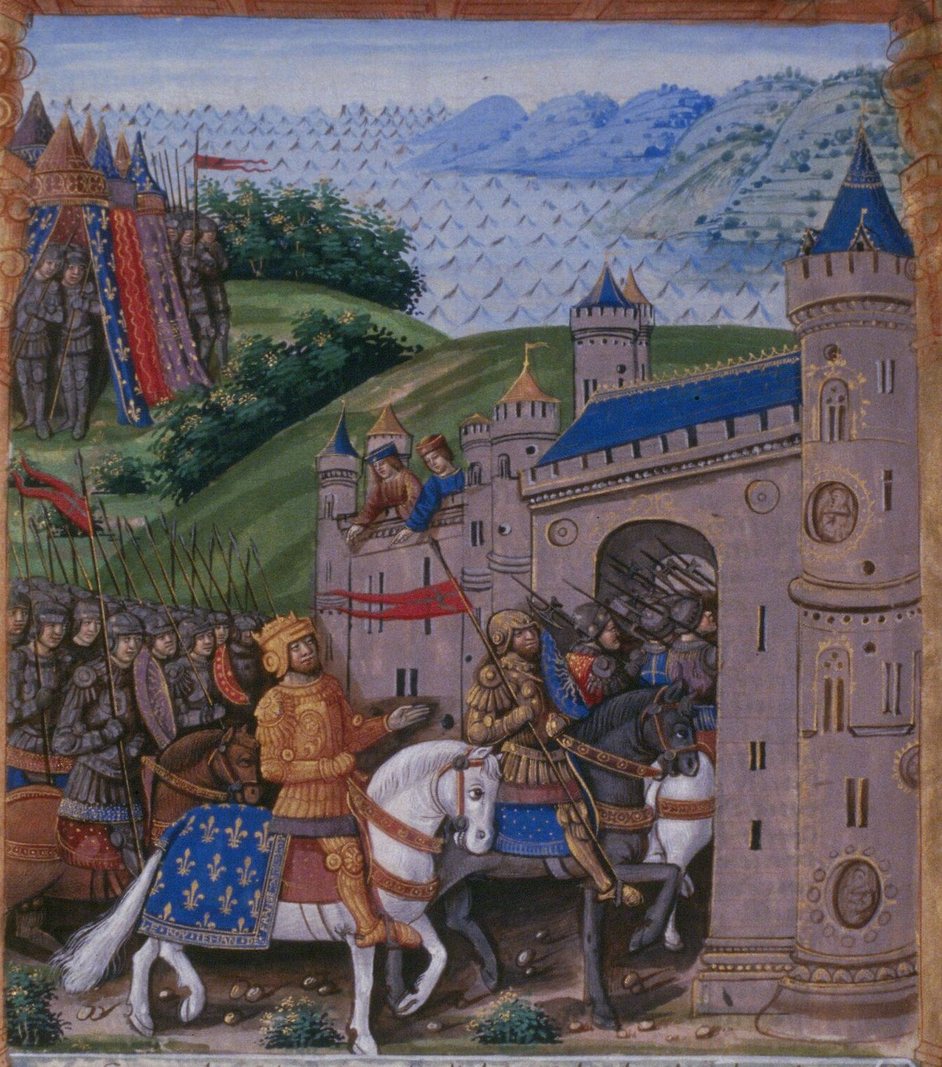 Prise de Saint Jean d'Angely 1351